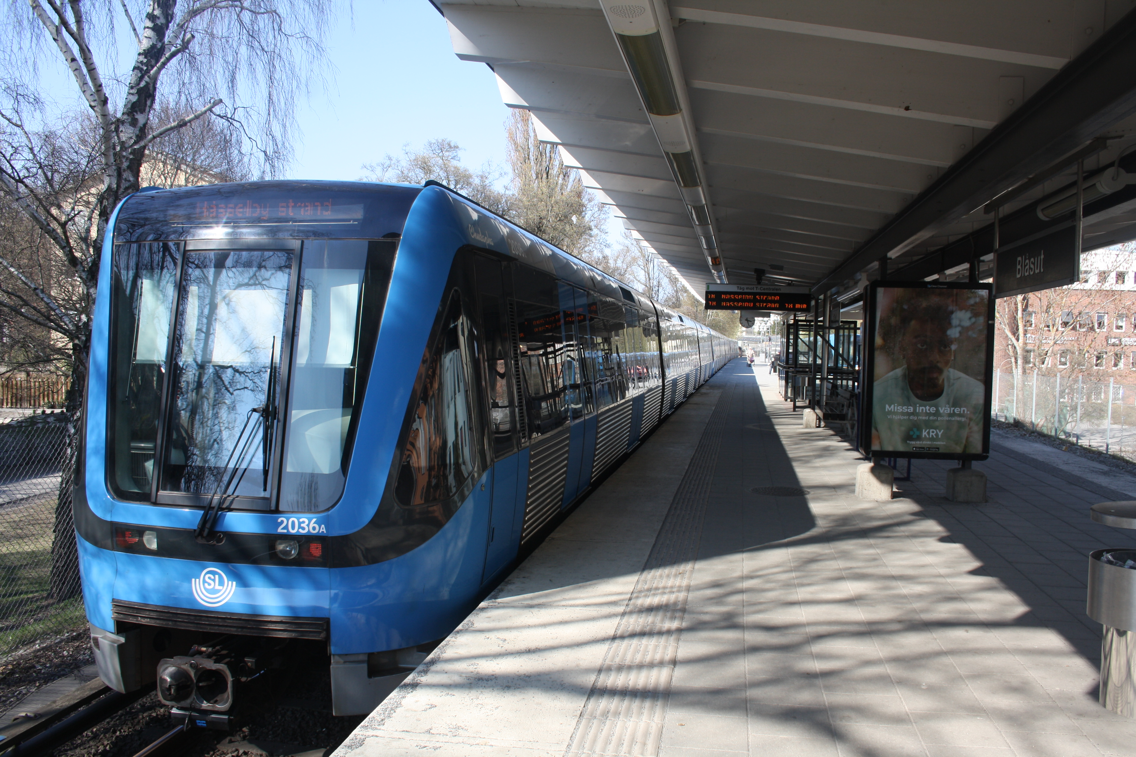 Blåsut station